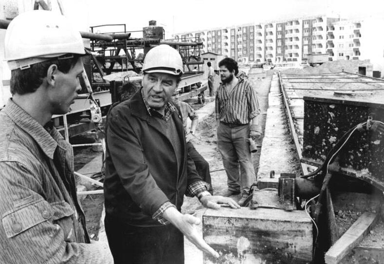 Rostock, Dierkow-Ost, Bauarbeiter ADN-ZB Sindermann 31.7.1984 pe os-Rostock: Paul Strauß - Bauexperte und Staatsmann.-Paul Strauß versteht sein Fach. Auf der Baustelle Dierkow-Ost, wo der achte Rostocker Neubau-Stadtteil entsteht, ist der Produktionsleiter des Betriebes 1 im WBK Rostock oft anzutreffen, um gemeinsam mit den Kollektiven Fragen und Probleme an Ort und Stelle zu lösen. Auch die Bauleute der Taktstraße Dieter Mahnke wissen seinen Rat zu schätzen. - Im Stadtteil Dierkow sollen noch bis Jahresende 1.000 Wohnungen entstehen. (Siehe dazu auch 1984-0731-9N, 11N und 12N, Archivfotos und ADN-Meldung)